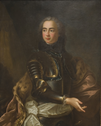 James Fitz-James Stuart, 3rd Duke of Berwick